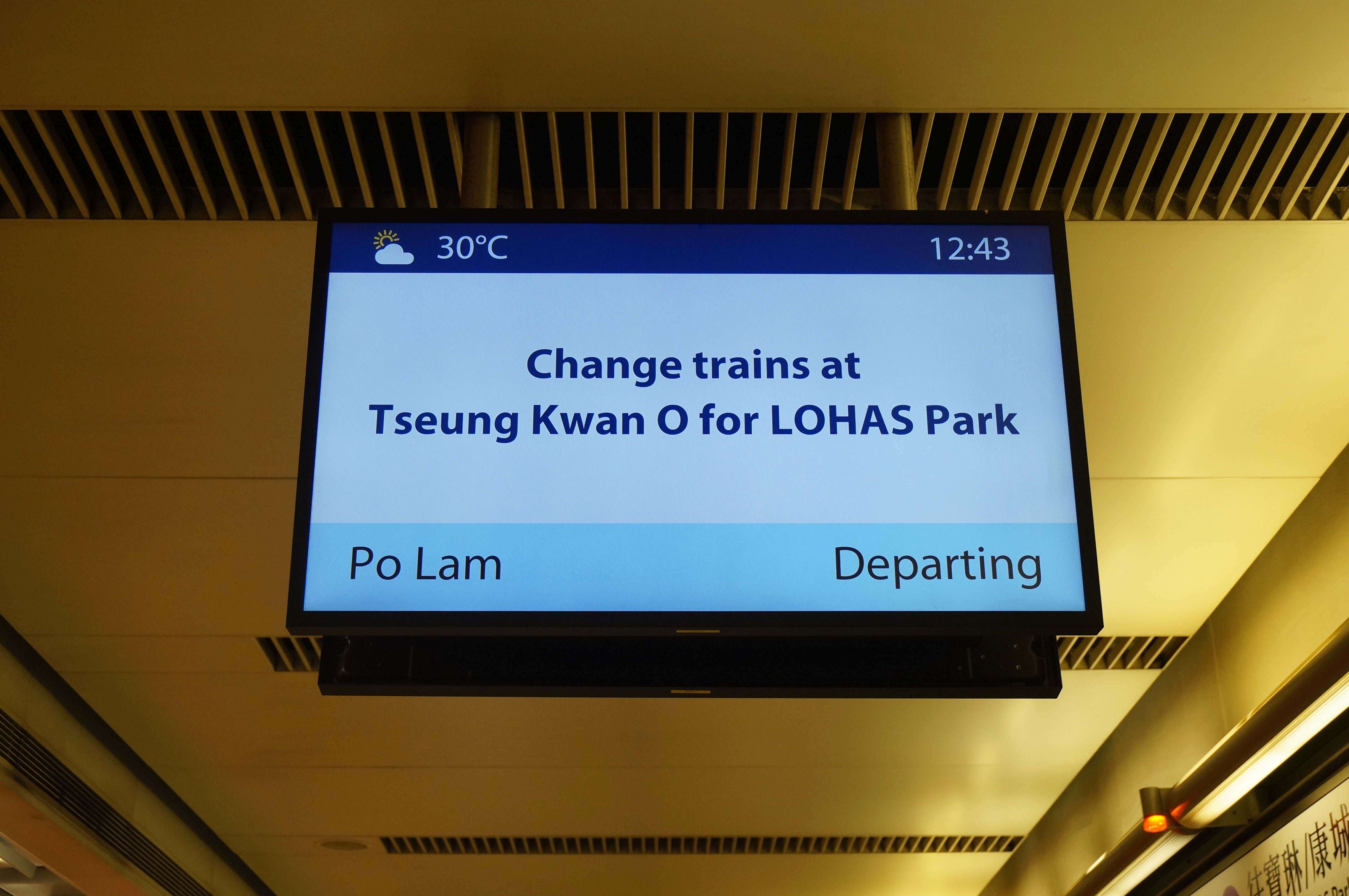 中文（香港）: 港鐵北角站月台乘客資訊顯示屏